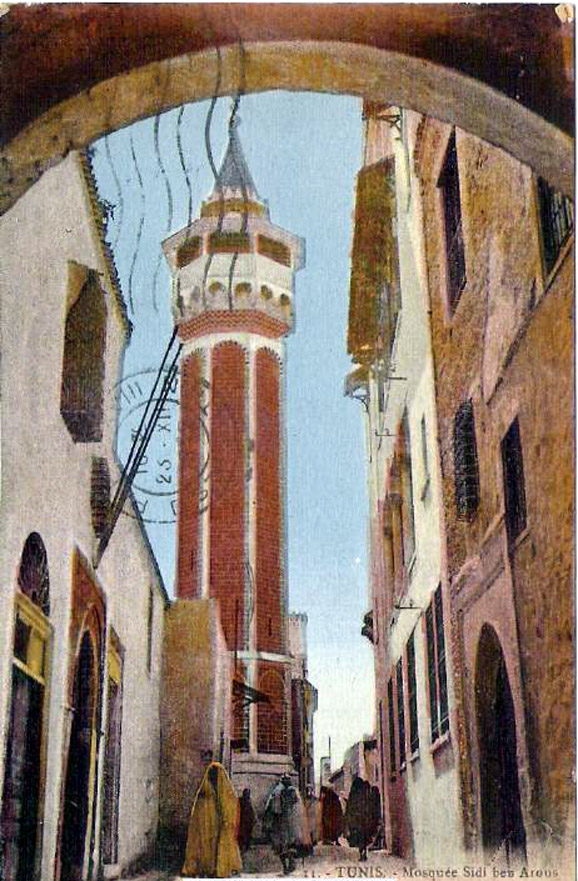 Hammouda Pacha Mosque in Tunis (Tunisia)